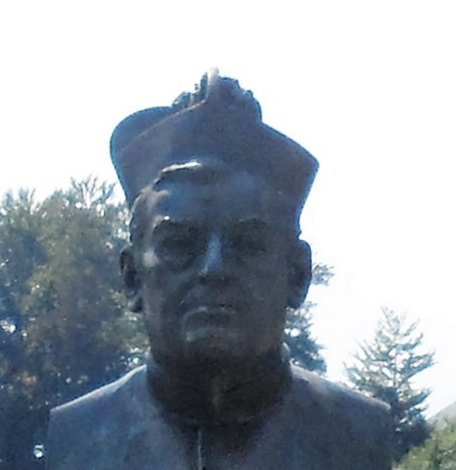 particolare della lapide di don Francesco Brignoli dewlla frazione Bani di Ardesio